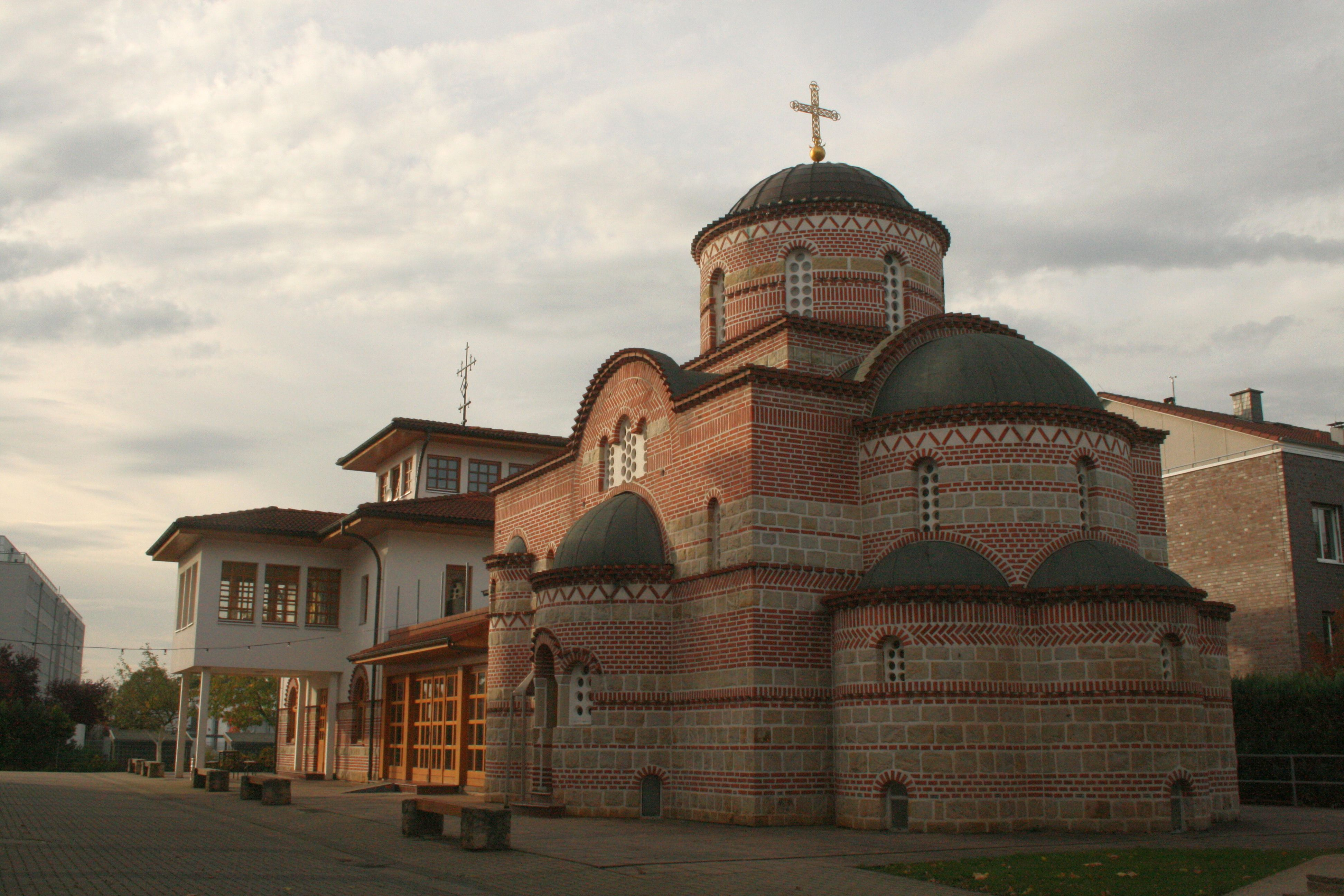 Serbisch-orthodoxe Kirche in Hannover-List, Mengendamm 16 C